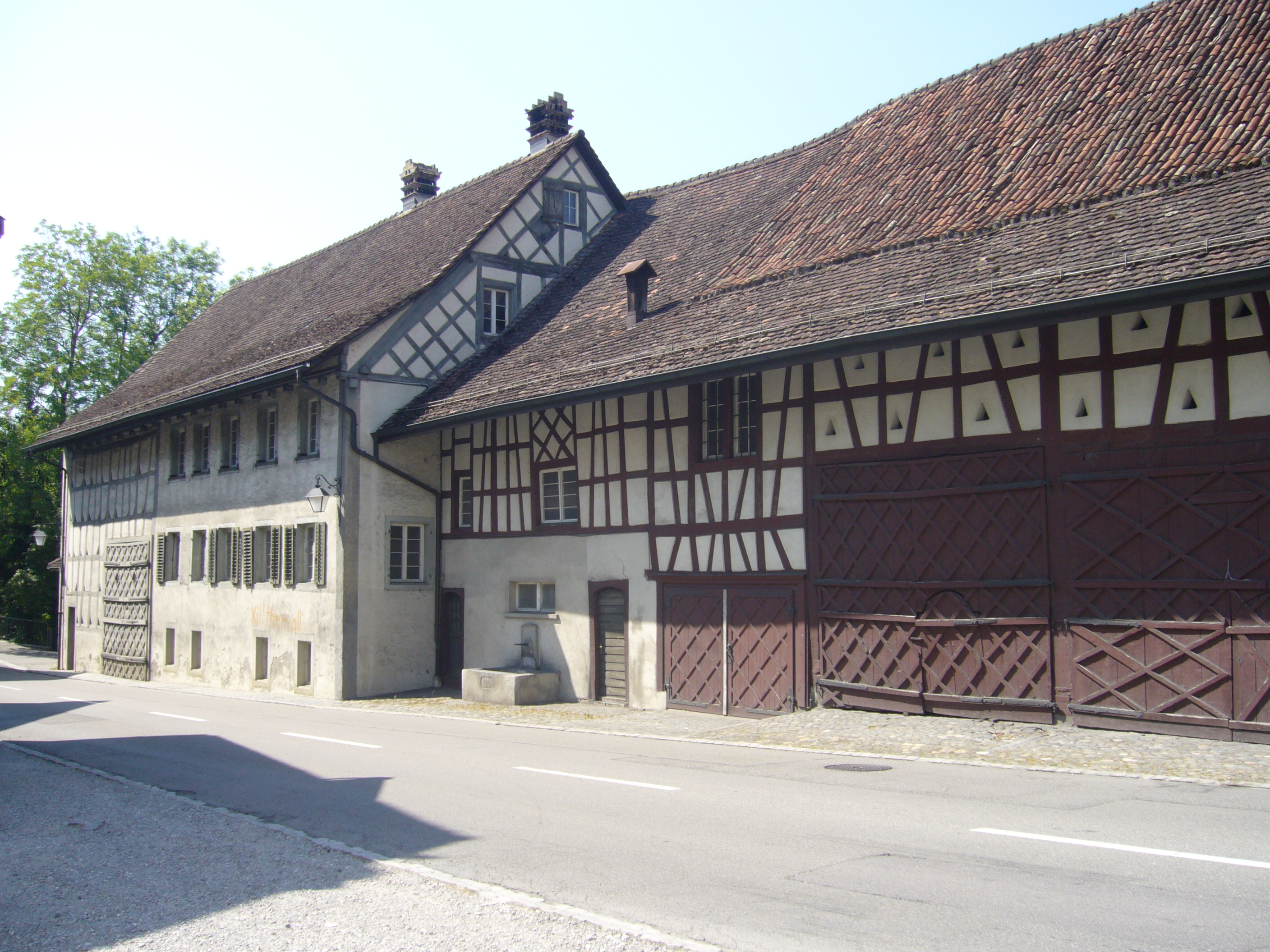 Häuser an der Wieshofstraße zu Wülflingen.